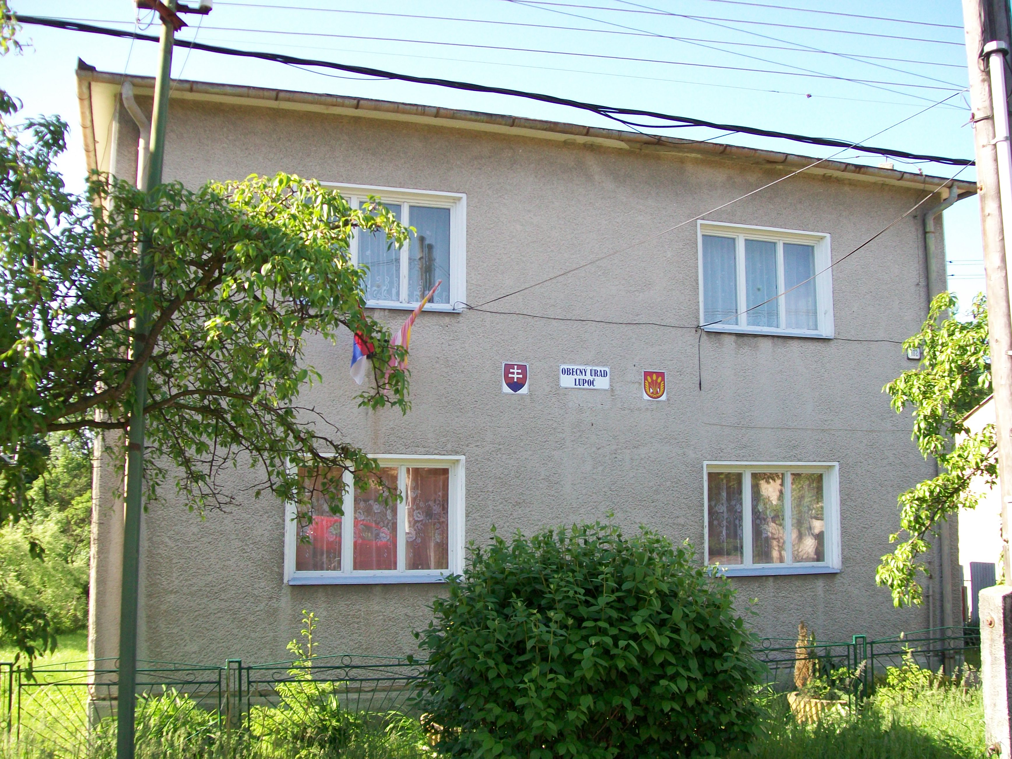 Obecný úrad v Lupoči